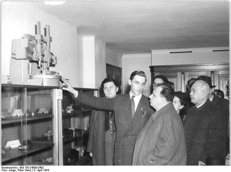 Zentralbild-Junge Hlg-Wi 5.4.1954 IV. Parteitag der sozialistischen Einheitspartei Deutschlands,Berlin, Werner-Seelenbinder-Halle Am 5.4.1954 besuchten die ungarischen Genossen, die als Gäste auf den IV.Parteitag der sozialistischen Eiheitspartei Deutschlands weilen, den VEB Drehmaschinenwerk "7. Oktober". UBz Im technischen Kabinett des VEB "7.Oktober" zeigt der Stellvertreter des Sekretärs der Betriebsparteiorganisation Heinz Dietrich dem Mitglied des Politbüros und Sekretär des Zentralkomitees der Partei der ungarischen Werktätigen Mihály Farkas (Mitte), das Modell einer Vertikaldrehbank.(rechts) Sándor Rónai, Mitglied des Zentralkomitees und Präsident der Nationalversammlung Ungarn 5.4.1954